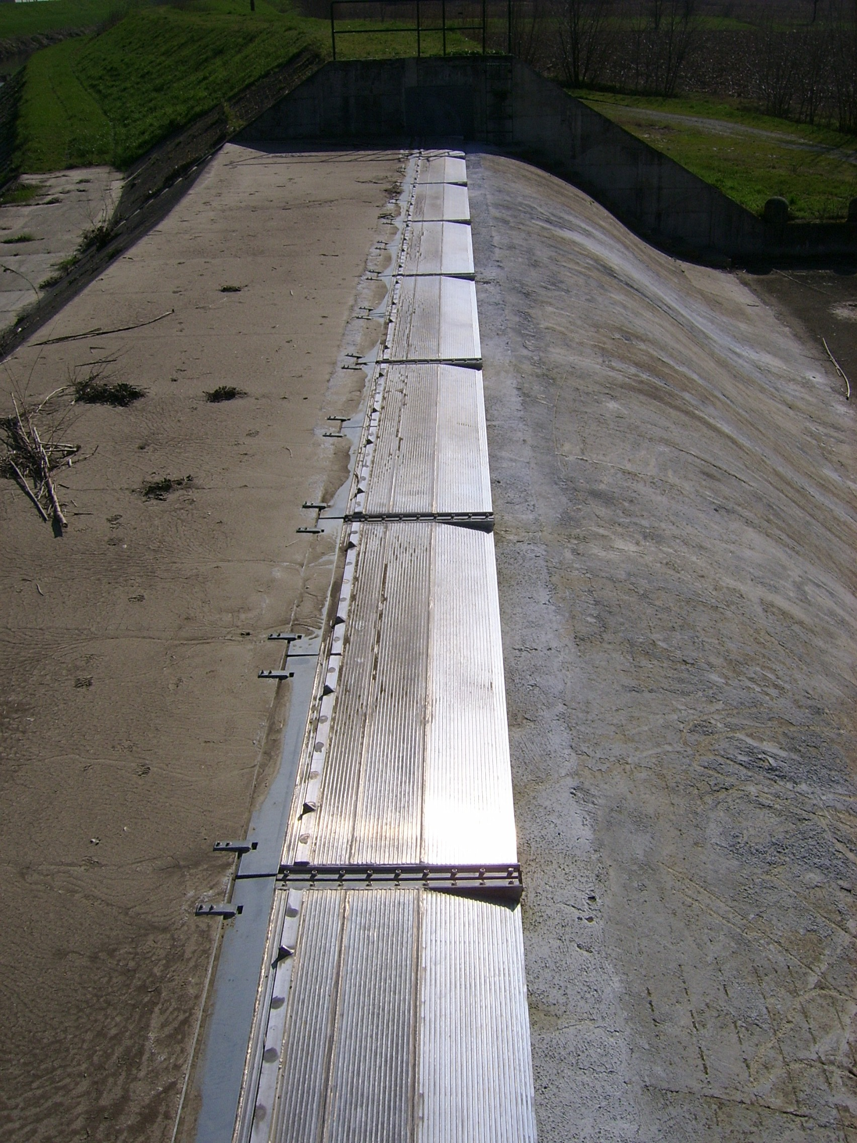 Scolmatore abbattuto in seguito ad una piena